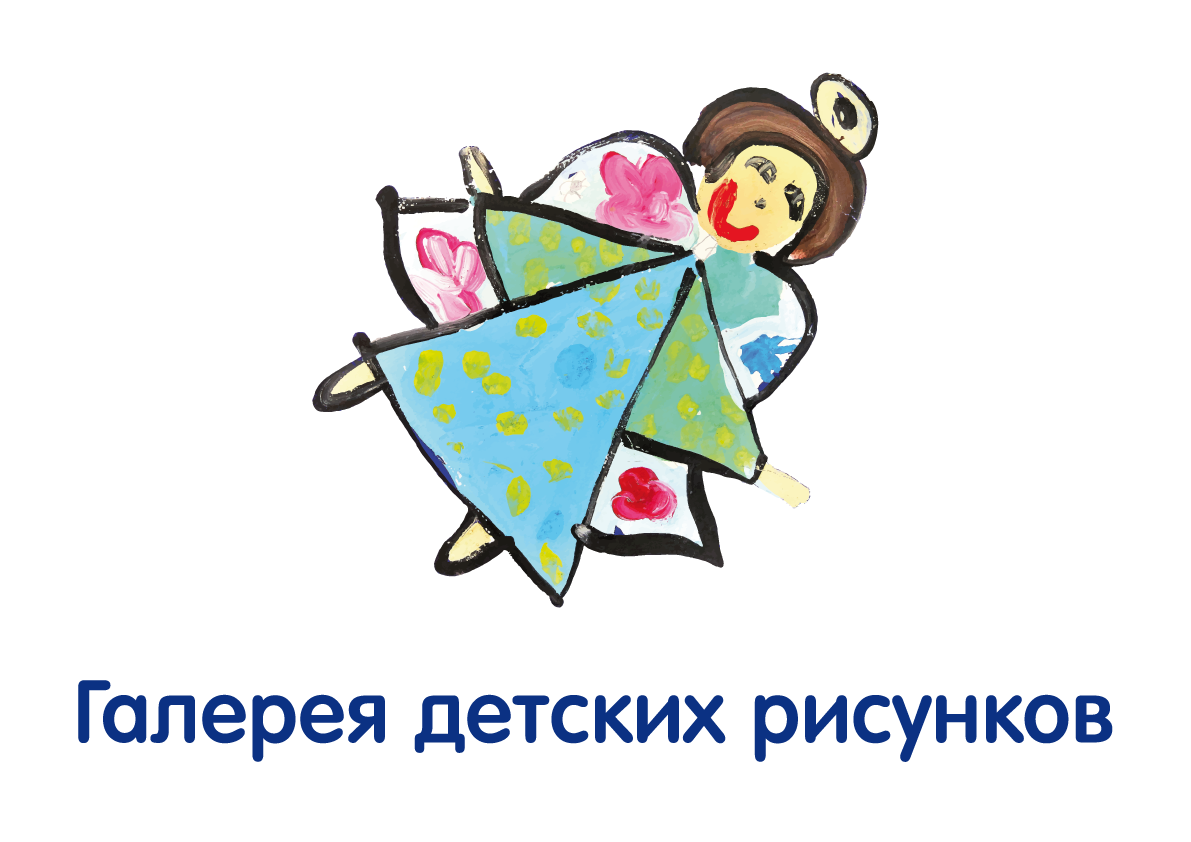 Логотип Конкурсу образотворчого мистецтва «ChildOpenArt»